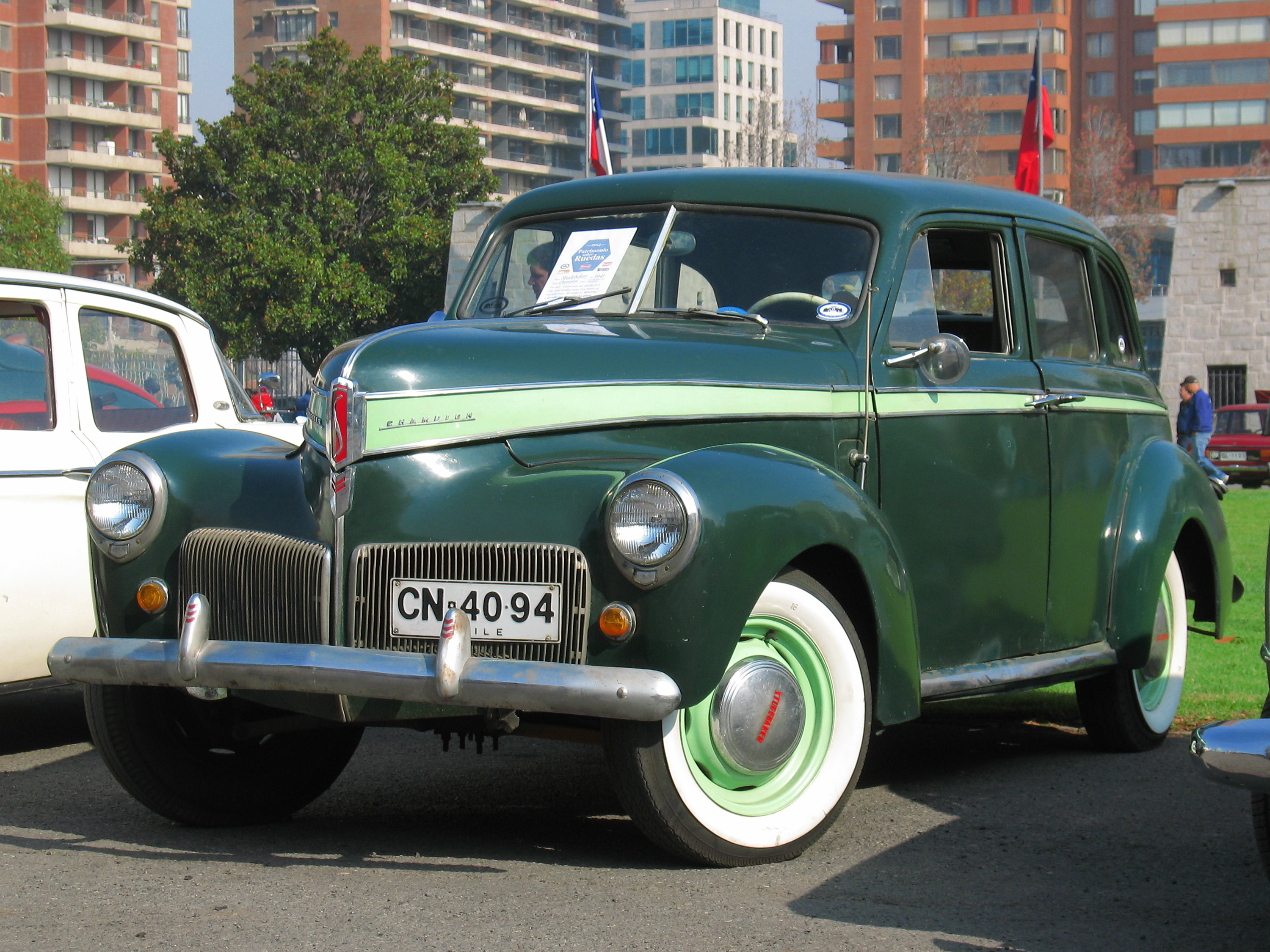 Studebaker Champion Sedan 1941